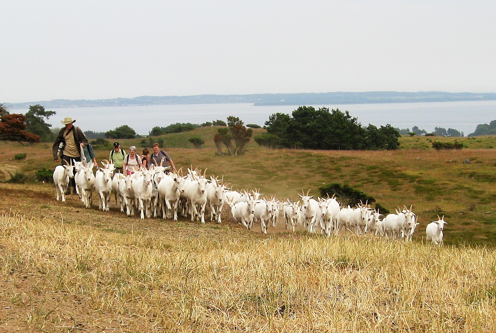 Trehøje, udsigt mod øst - geder